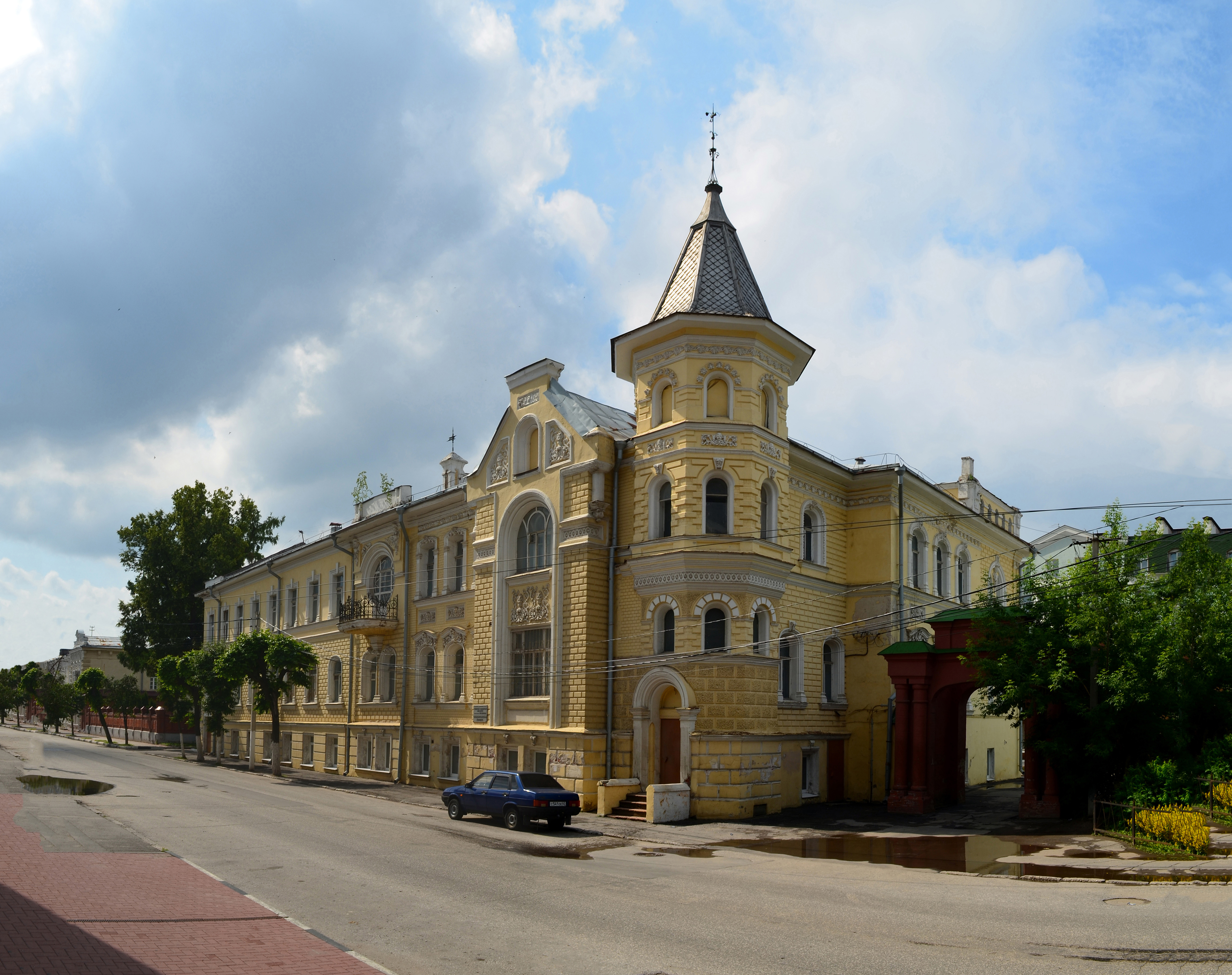 г.Рязань,ул.Полонского,д.13.Бывший особняк купца П.Ф.Лебедева,ныне физиологический корпус РязГМУ.